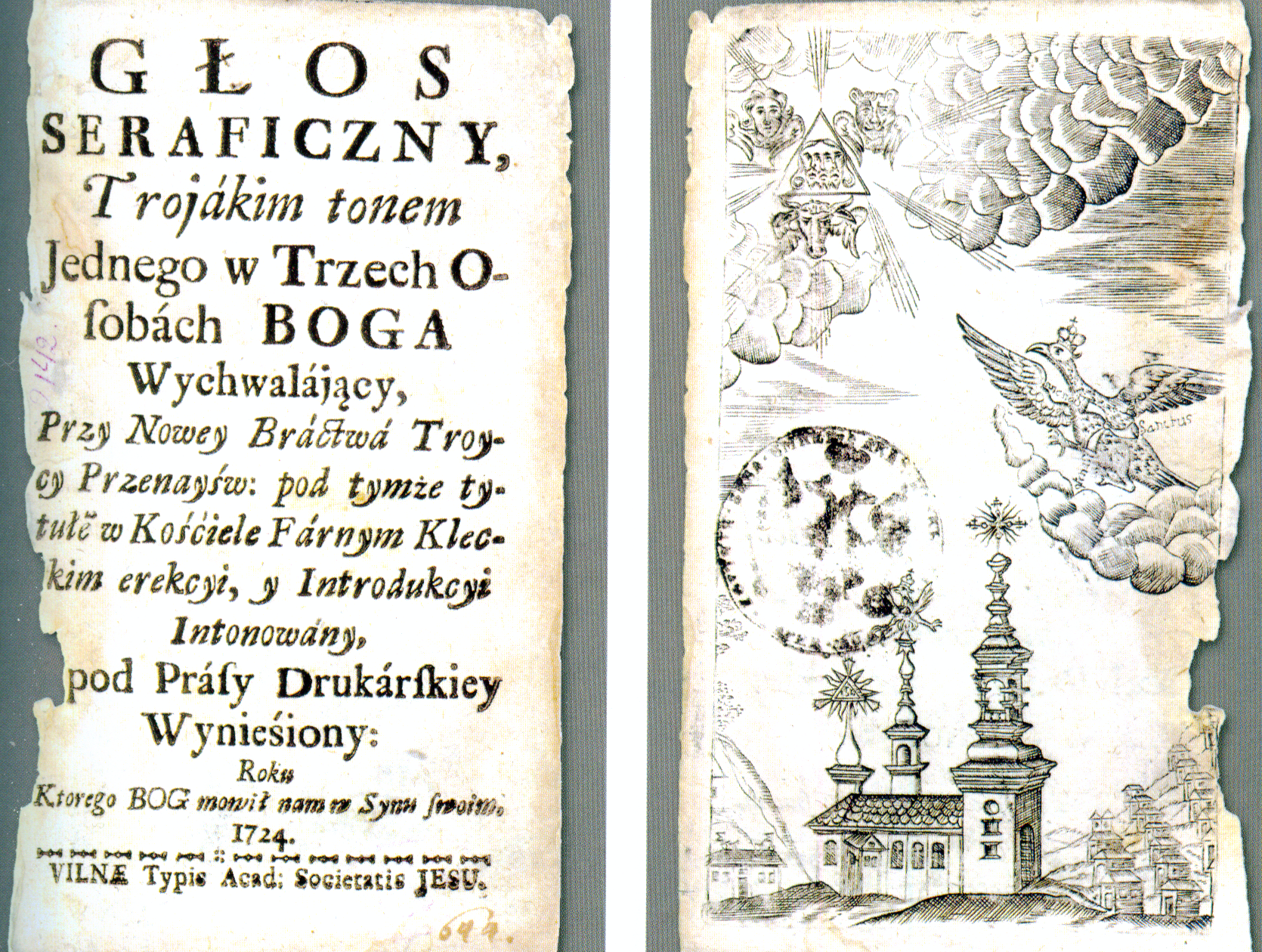 Страница книги "Голос серафимный..."